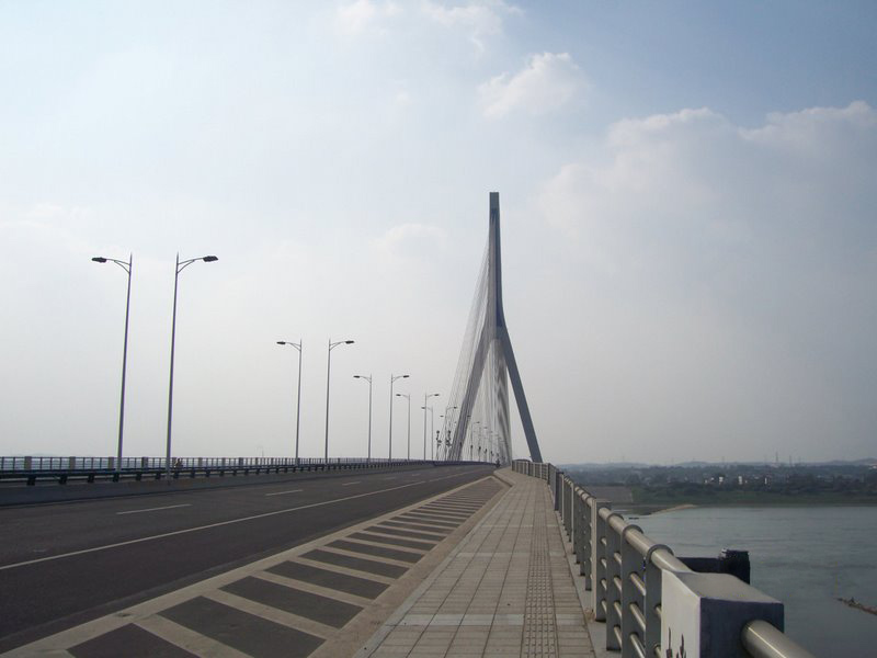 株洲建宁大桥(三桥)